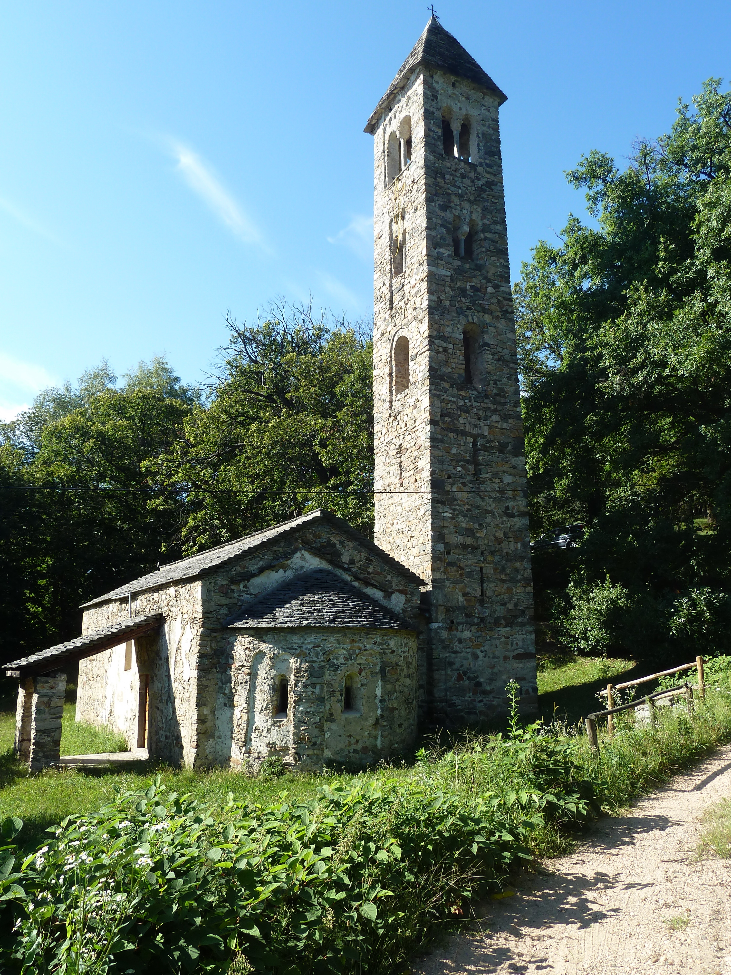 Sonvico - Oratorio di San Martino - Abside